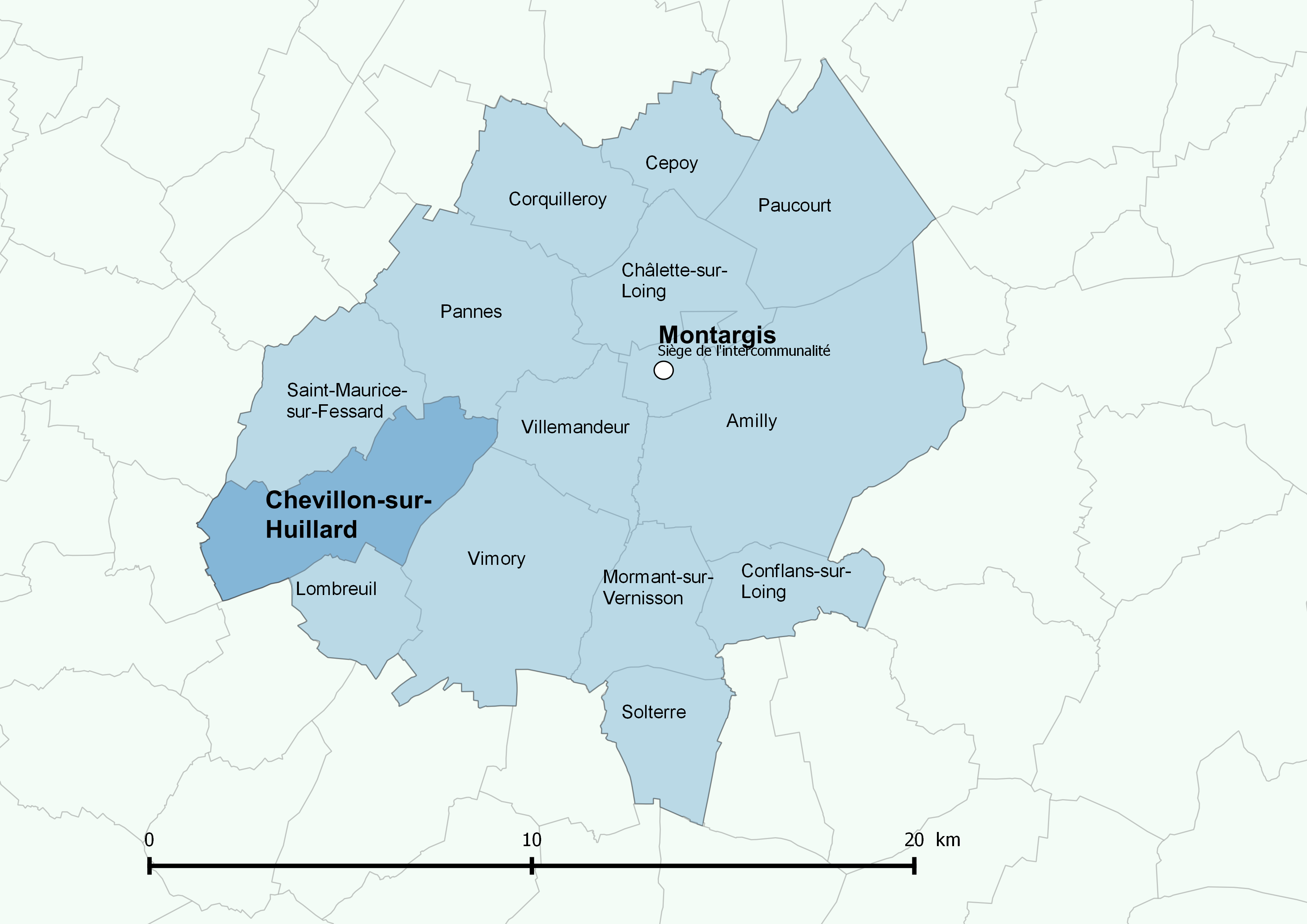 Périmètre de l'Agglomération montargoise et rives du Loing - Positionnement de la commune de Chevillon-sur-Huillard